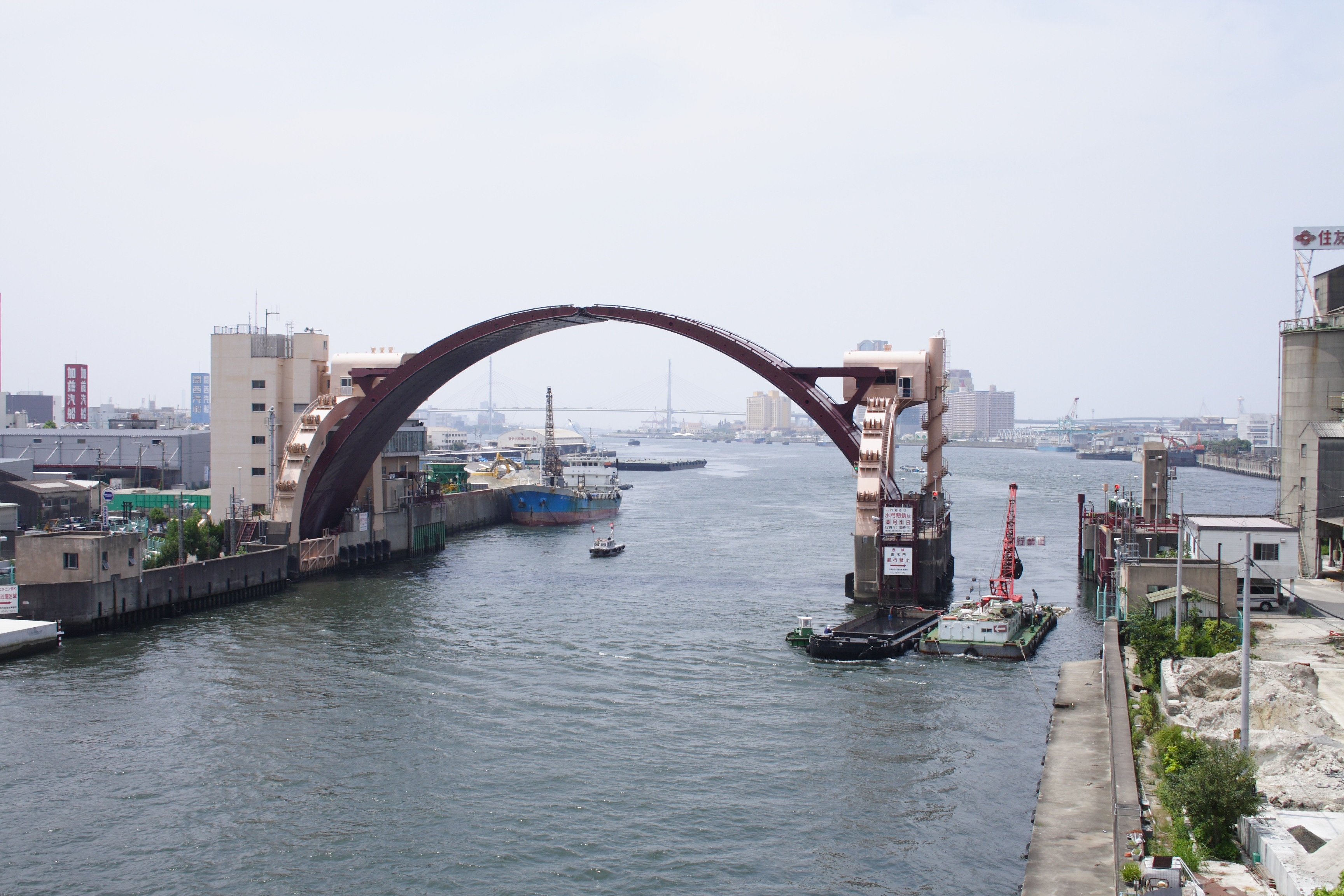 Ajigawa Suimon Gates/ 安治川水門